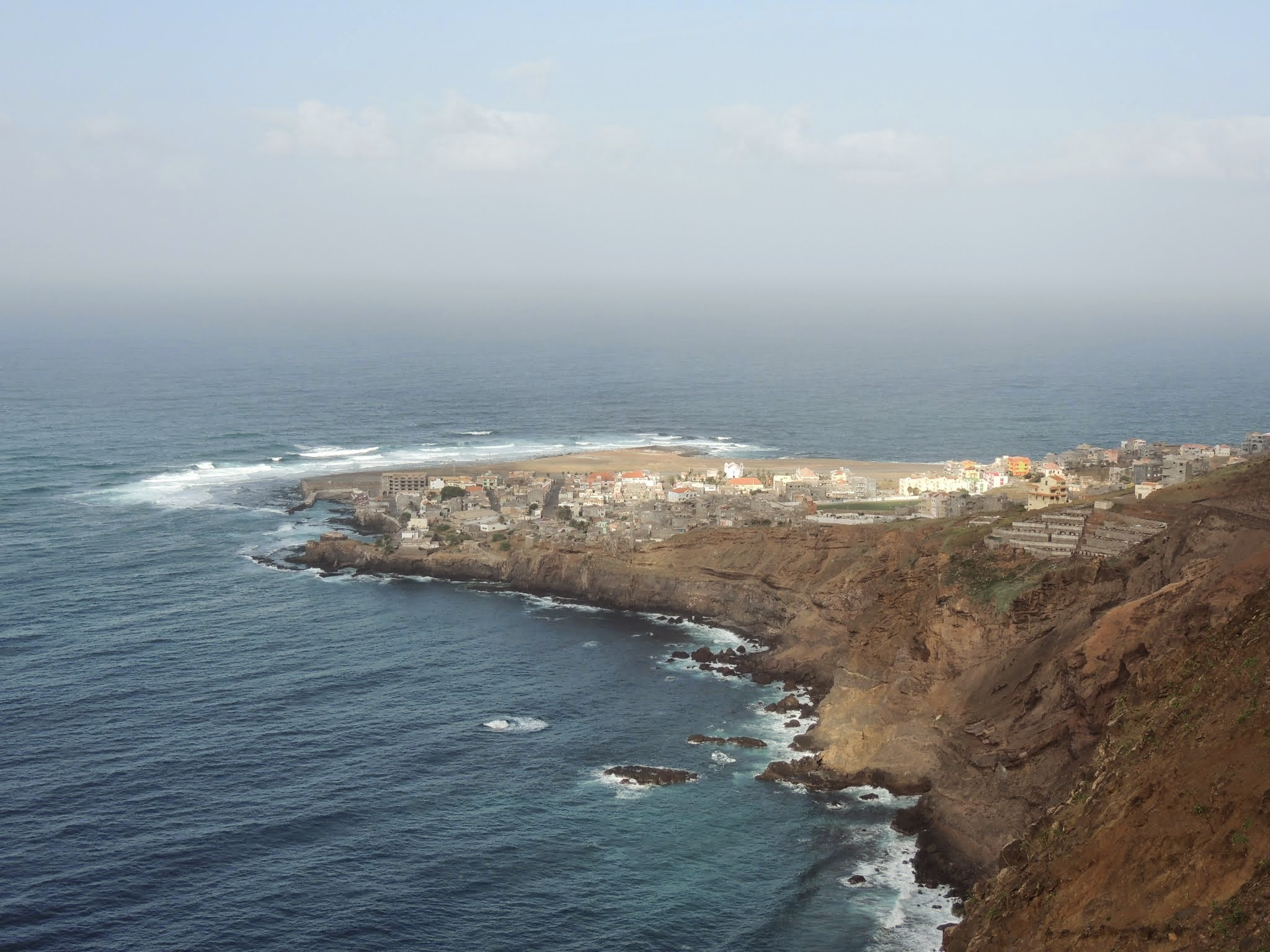 la ville de Ponta do Sol occupe une presqu'île au nord de l'île de Santo Antao (Cap-Vert)